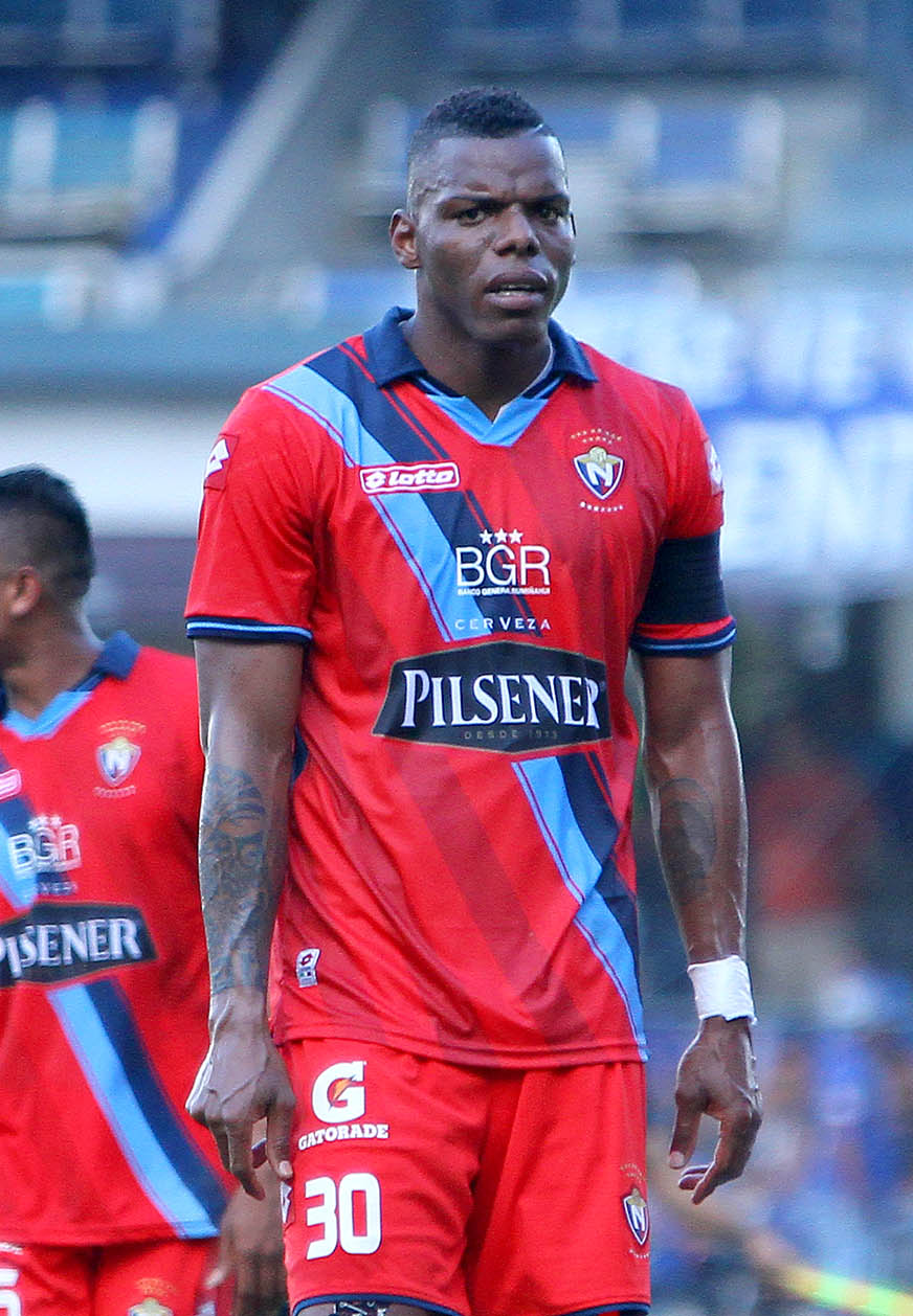 Guayaquil, 03 may (Andes).-Jugadores de El Nacional abandonan el campo de juego luego de caer 0x2 ante Emelec en el partido por la décimo sexta fecha del campeonato nacional de fútbol Foto:César Muñoz/Andes